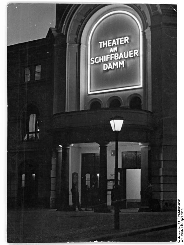 Berlin, Theater am Schiffbauerdamm, Nacht Zentralbild Weiß 15.4.52 Das nächtliche Berlin. UBz: Das Theater am Schiffbauerdamm.